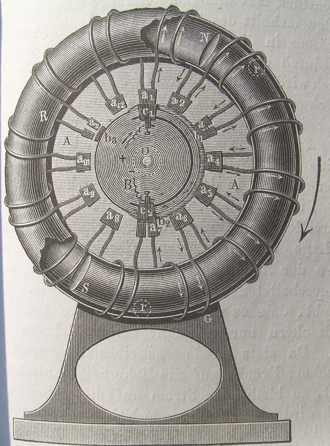 Elektromotor nach Kravogl. Mechaniker Kravogl in Wilten bei Innsbruck hat im Jahre 1867 einen elektromagnetischen Motor erfunden und ausgeführt, welcher nach den Messungen von A.v.Waltenhofen die besten bis dain construierten Apparate dieser Art an Nutzeffect um das Achtfache übertraf und auch die die Eigenthümlichkeit seiner Construction Interesse erregt. Wie geben hier statt einer genaues Zeichnung eine ideal gehaltene Abbildung, aus welcher die Construction deutlicher zu ersehen ist (Fig. 460)